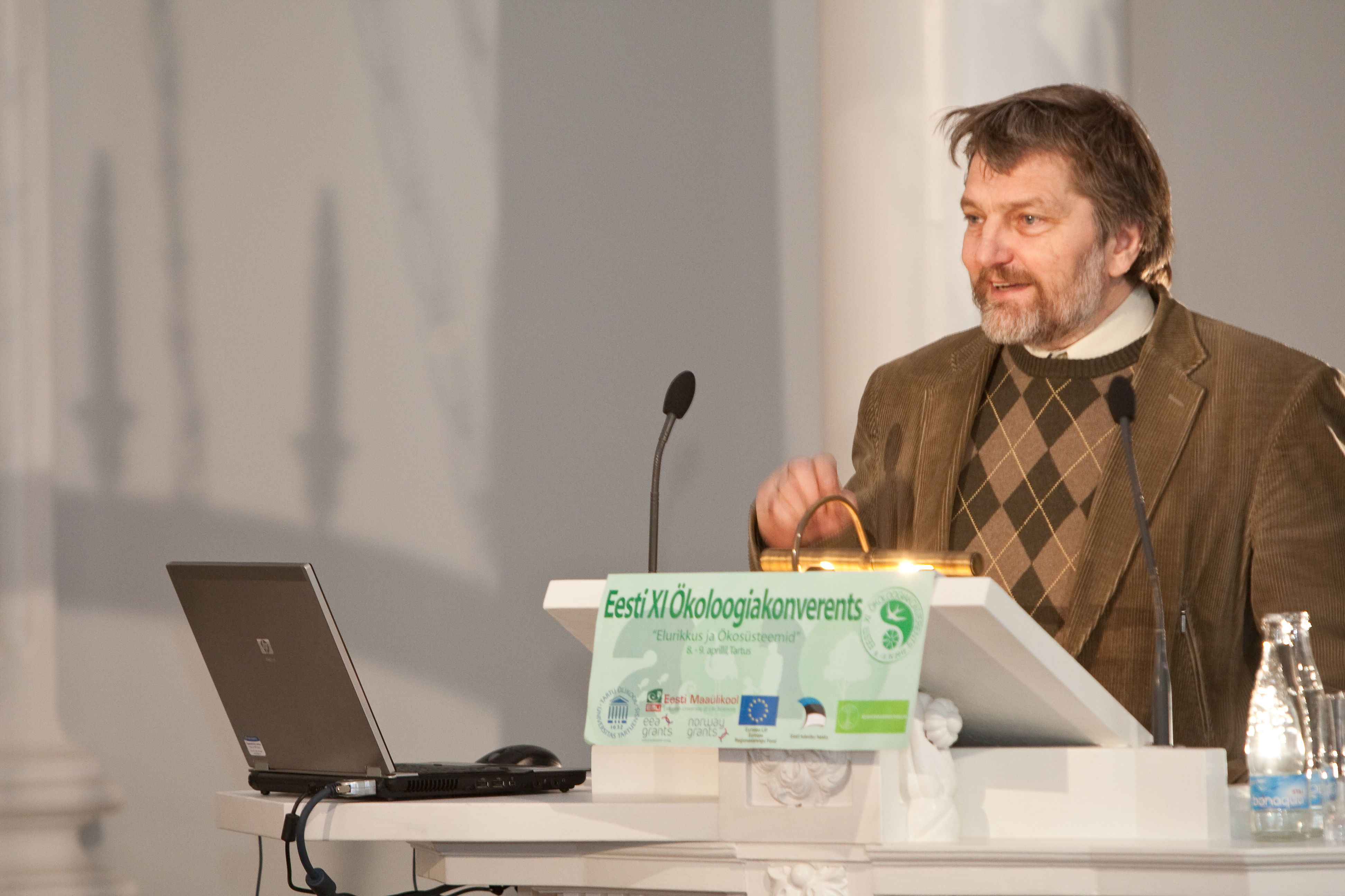 8.-9. aprillil 2010 toimus Tartus XI Eesti ökoloogiakonverents "Elurikkus ja ökosüsteemid", mis kuulub ÜRO rahvusvahelise elurikkuse aasta ürituste sarja ning tähistab ka Eesti looduskaitse 100. aastapäeva. Konverentsi 1. päev. Pildil TÜ geoinformaatika ja kartograafia õppetooli juhataja professor Tõnu Oja esinemas ettekandega "Geoinfosüsteemide rakendustest".